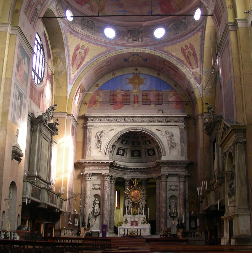 Padova, chiesa del Carmine, interno